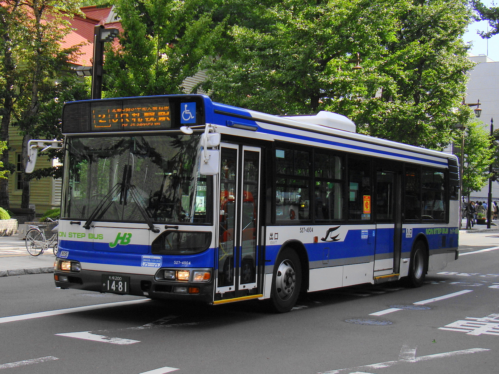 Sapporo city line